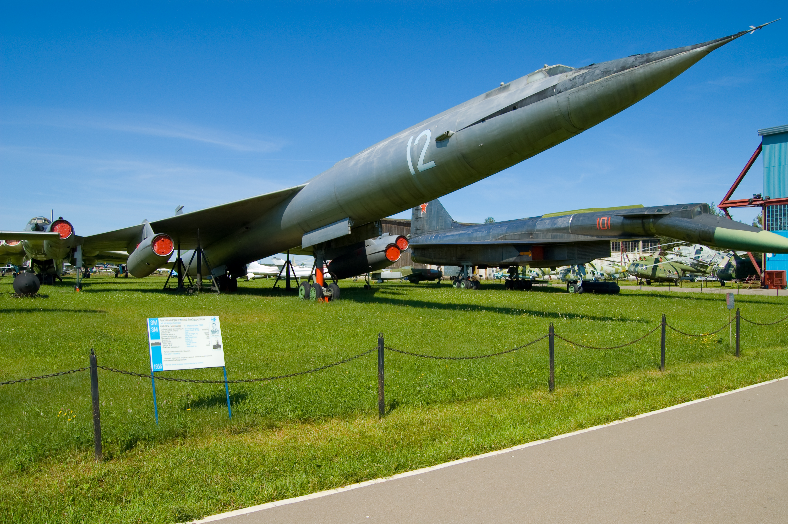 M-50 M-50